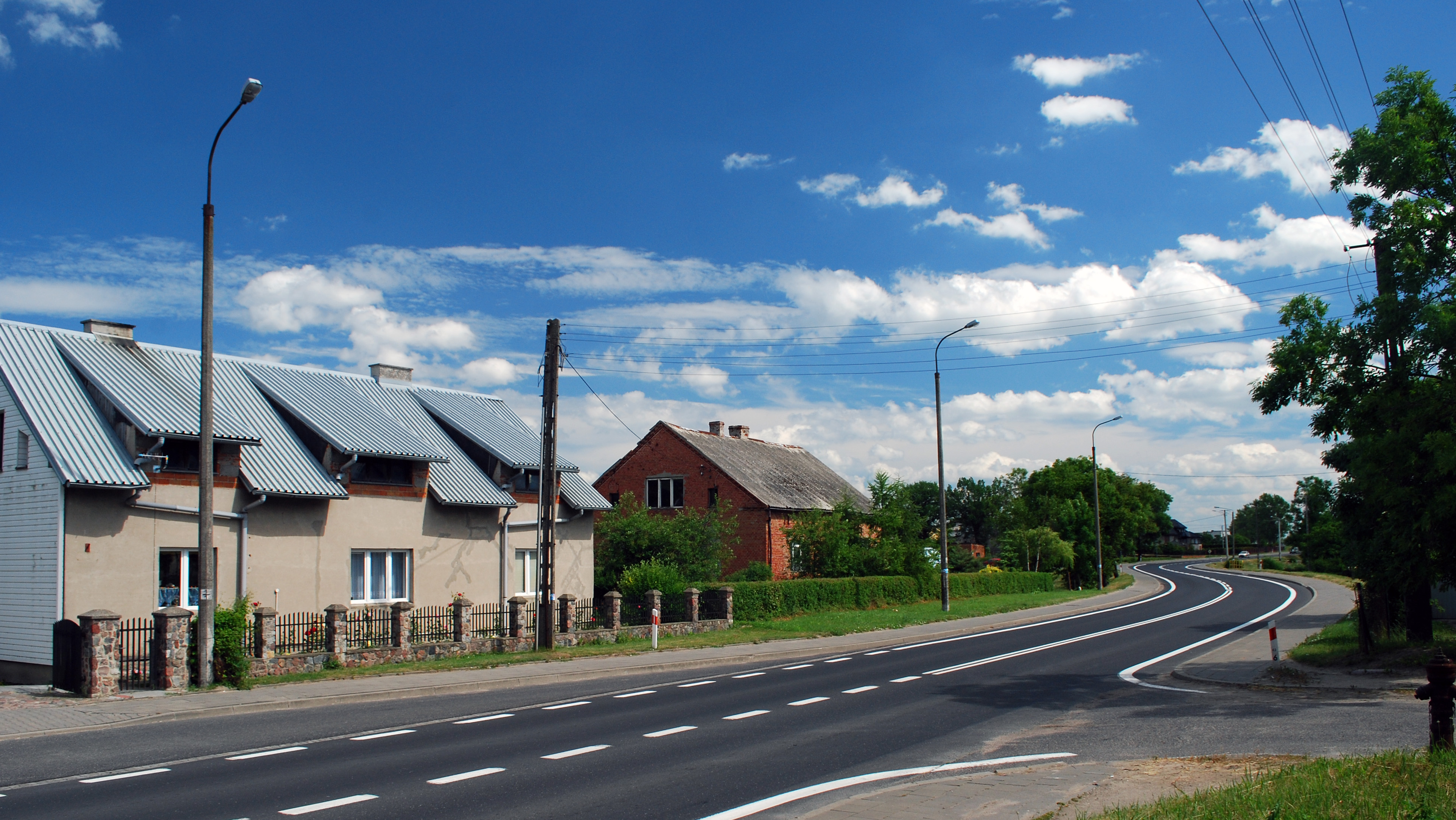 Ulica we wsi pl: Lignowy Szlacheckie.